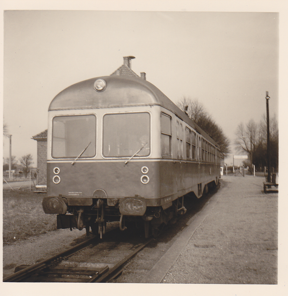 MaK GDT der Kiel-Schönberger Eisenbahn, Bahnhof Schönberger Strand